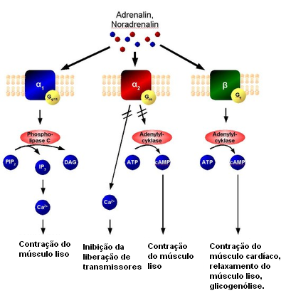 Transdução de sinal dos receptores adrenérgicos.